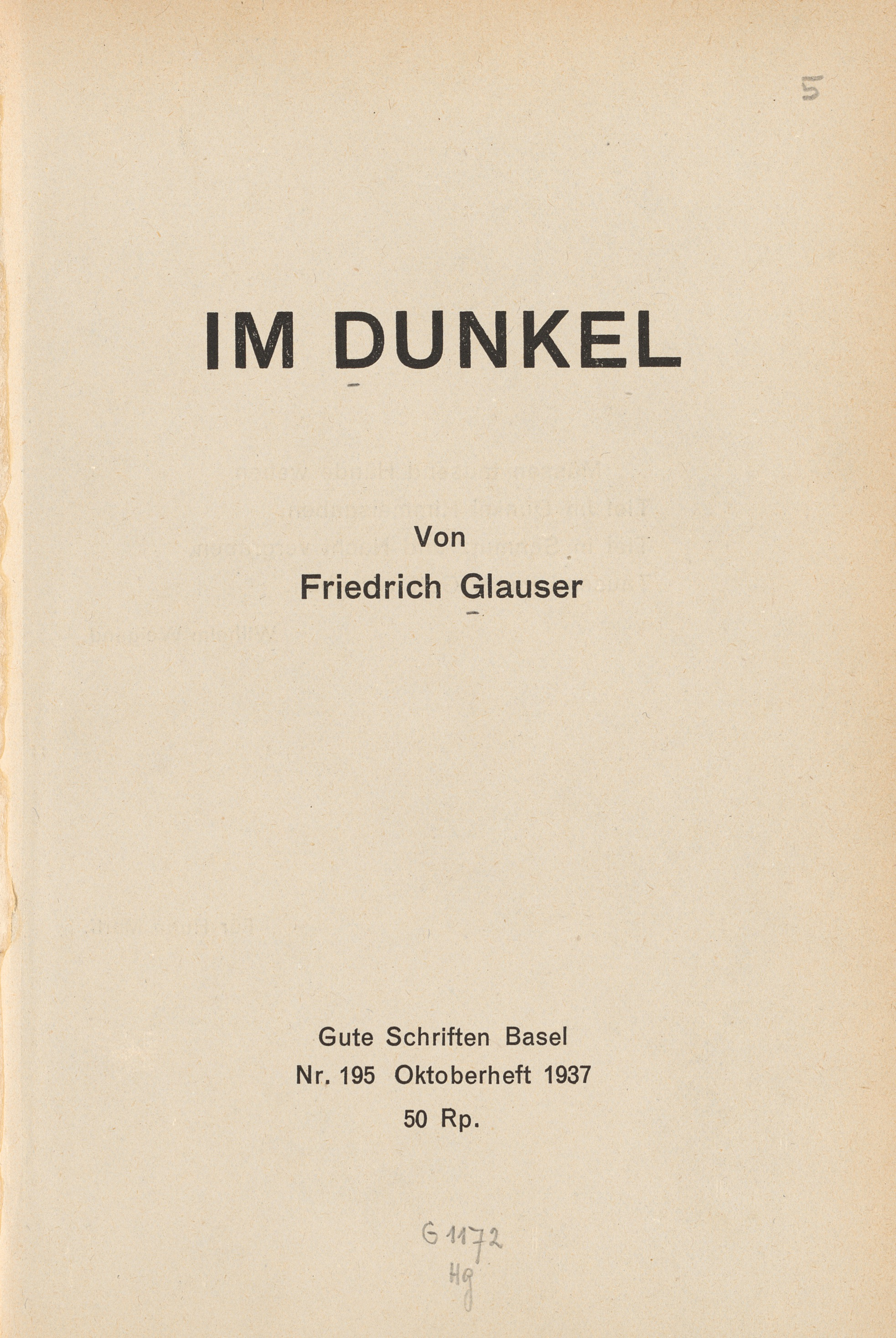 Titelseite des Heftes Nr. 195 der Reihe "Gute Schriften Basel". "Im Dunkel" von Friedrich Glauser, 1937